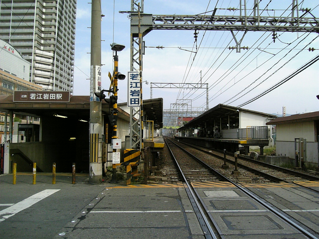 近鉄若江岩田駅 2006年10月撮影。 機材：V604SH 撮影者：Kansai explorer